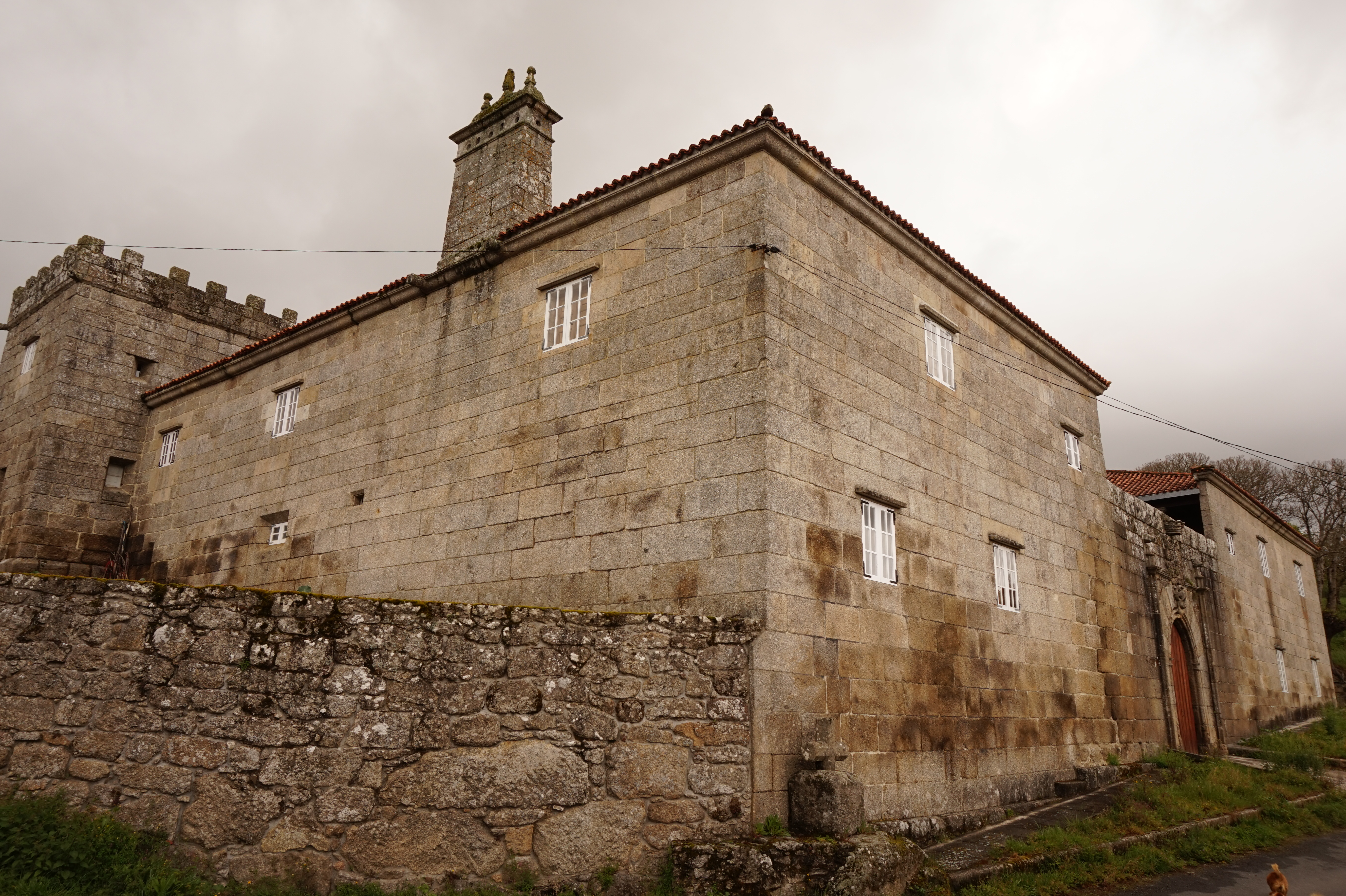 Pazo de San Pedro, San Pedro, Bemibre, Taboada, Galiza